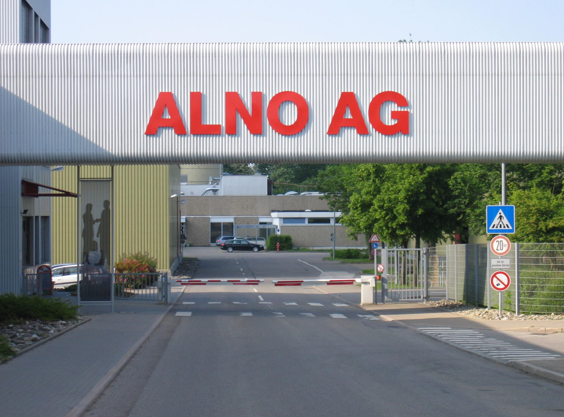 Stammwerk Pfullendorf der Alno AG